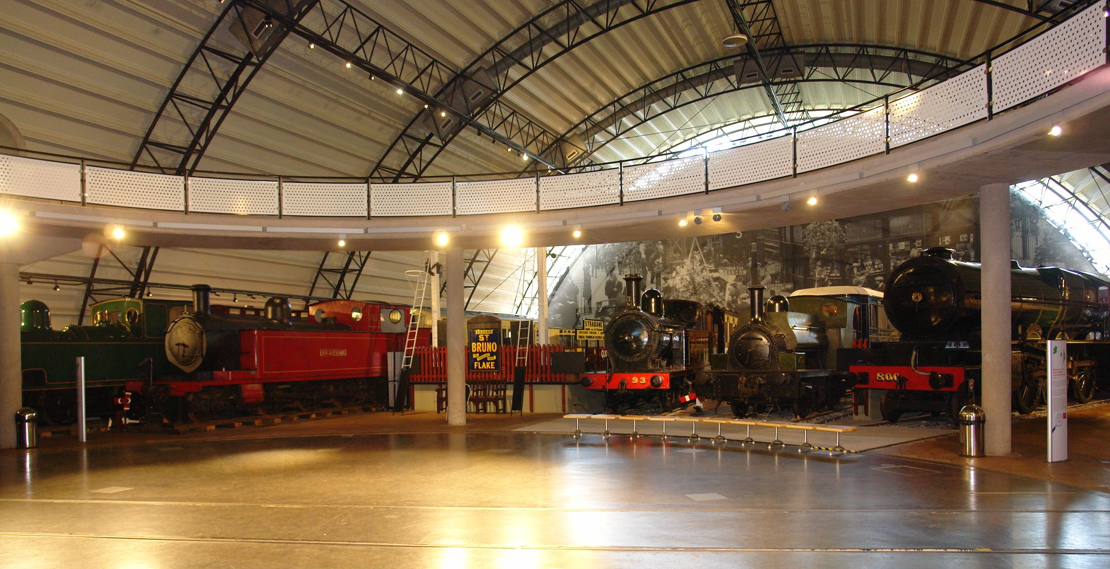 Ulster Transport Museum, Cultra, Railway Gallery